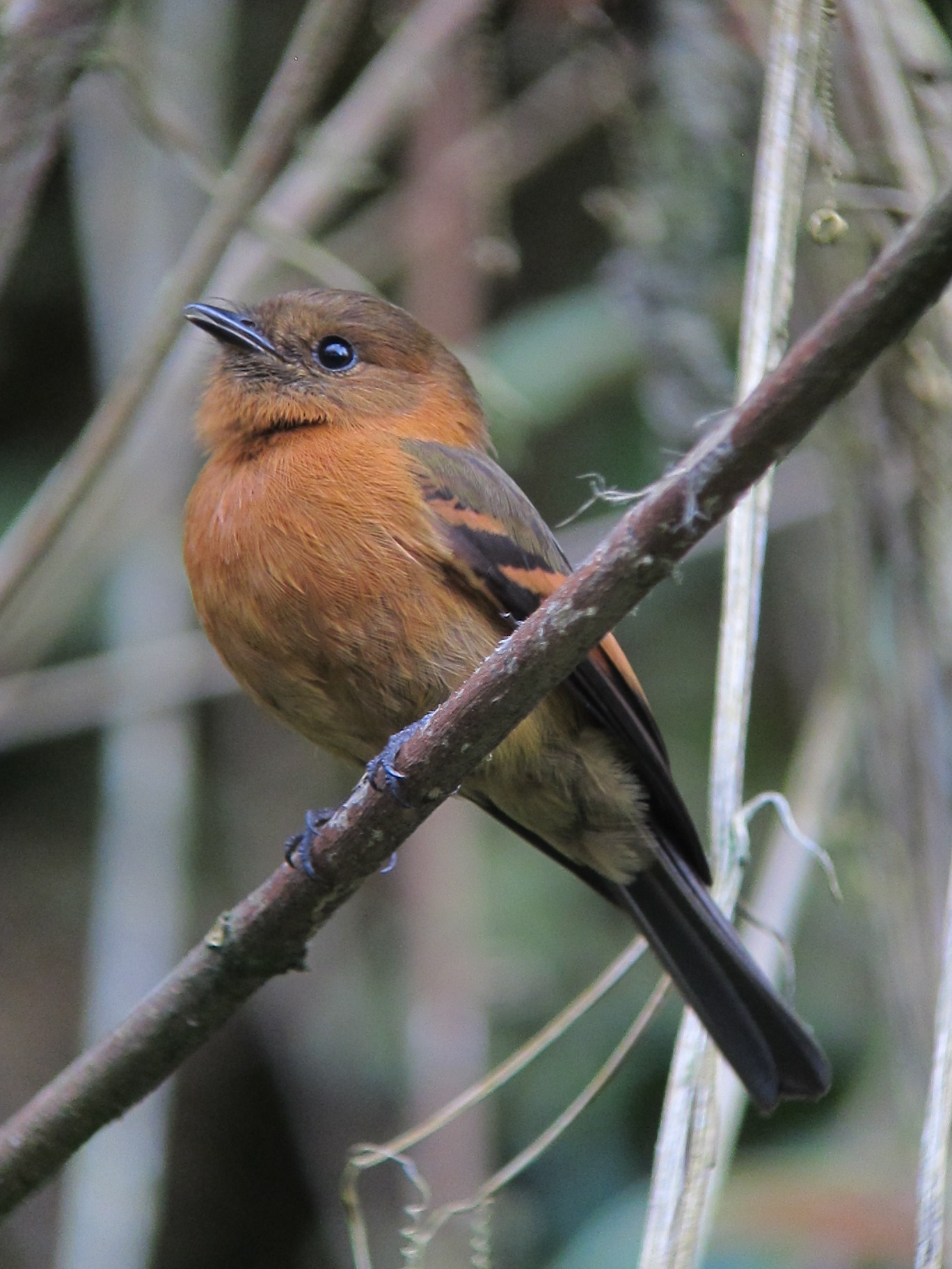 Manizales, Caldas, Colombia ( Río Blanco )